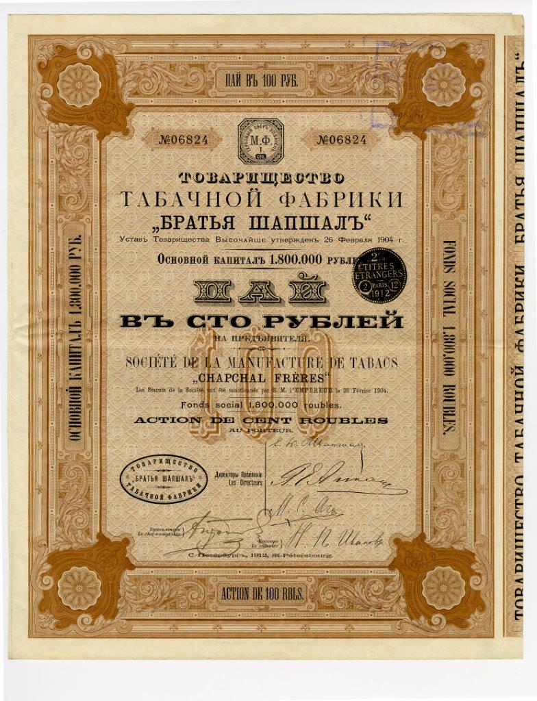 Пай в 100 руб. на предъявителя Товарищества табачной фабрики "Братья Шапшаль". С.-Петербург, 1912 г.